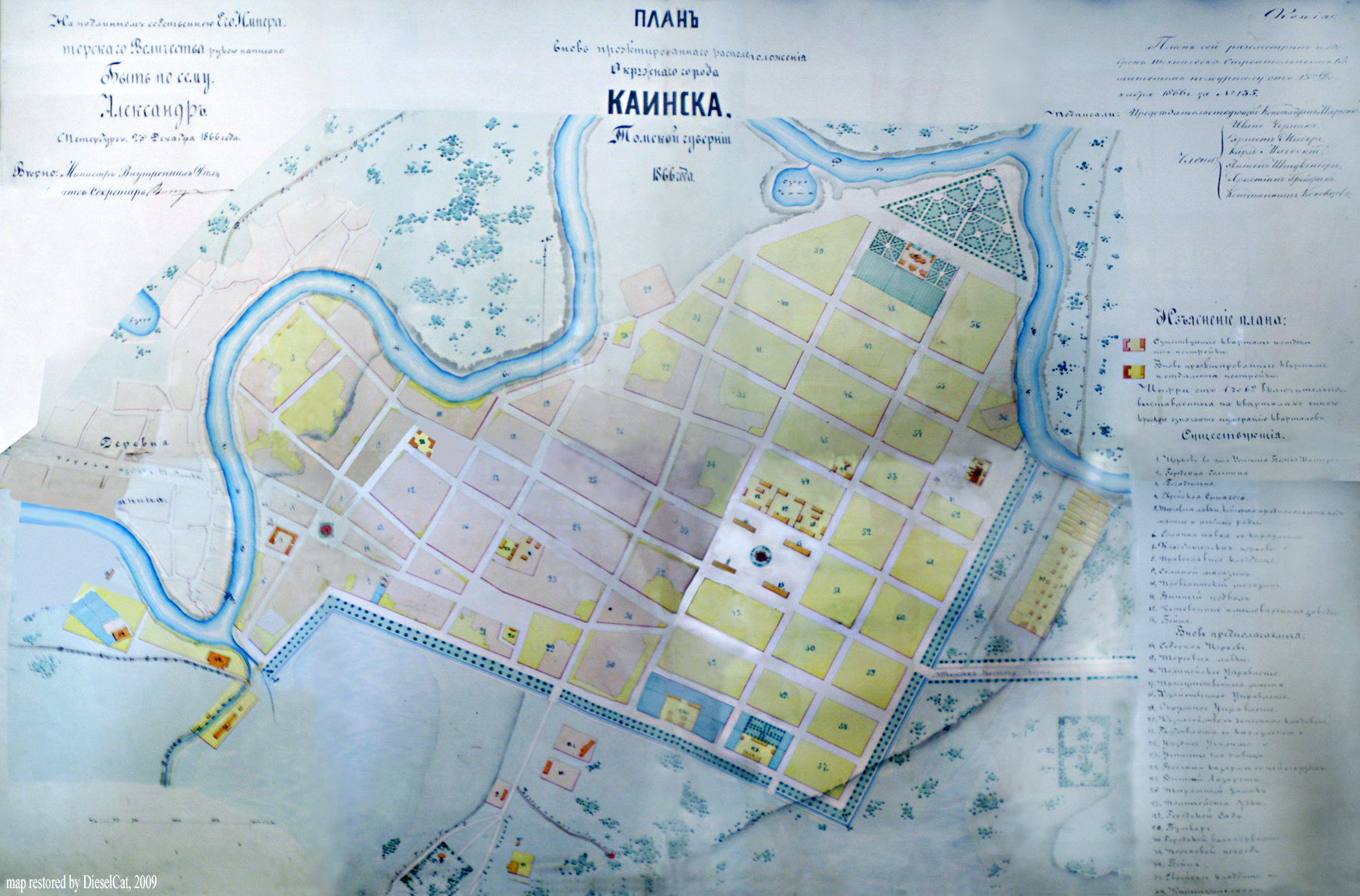 Kainsk-plan-1866y Plan project 1866 year. City - Kainsk (now - Kuibyshev. Novosibirsk district. Russia). Image restored by DieselCat/